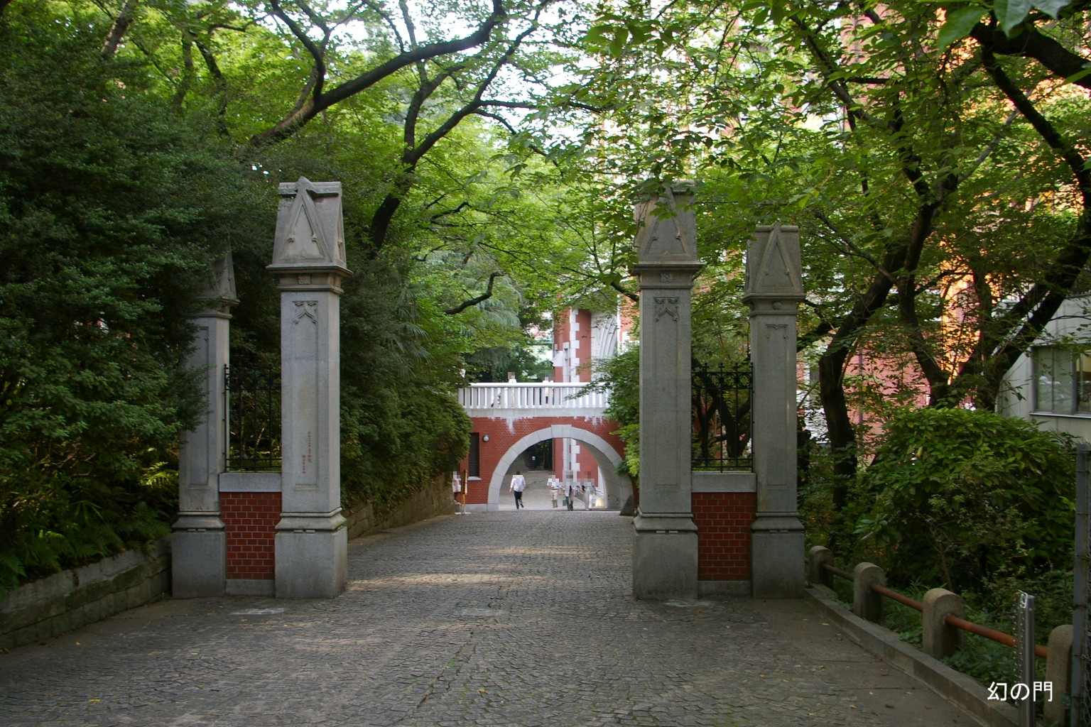 2009.5日本国内で塾生 (talk)が撮影。